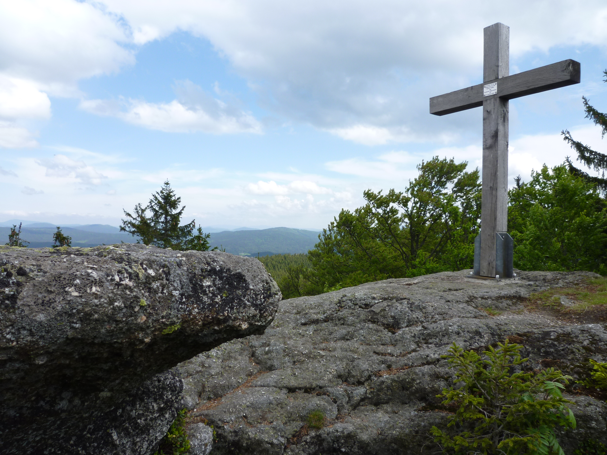 Großalmeyerschloss NW on Mauth im Schönbrunner Wald gelegen. Die Felsformation gehört zu den Geotopen im Landkreis Freyung-Grafenau (272R015) und liegt im Nationalpark Bayerischer Wald.